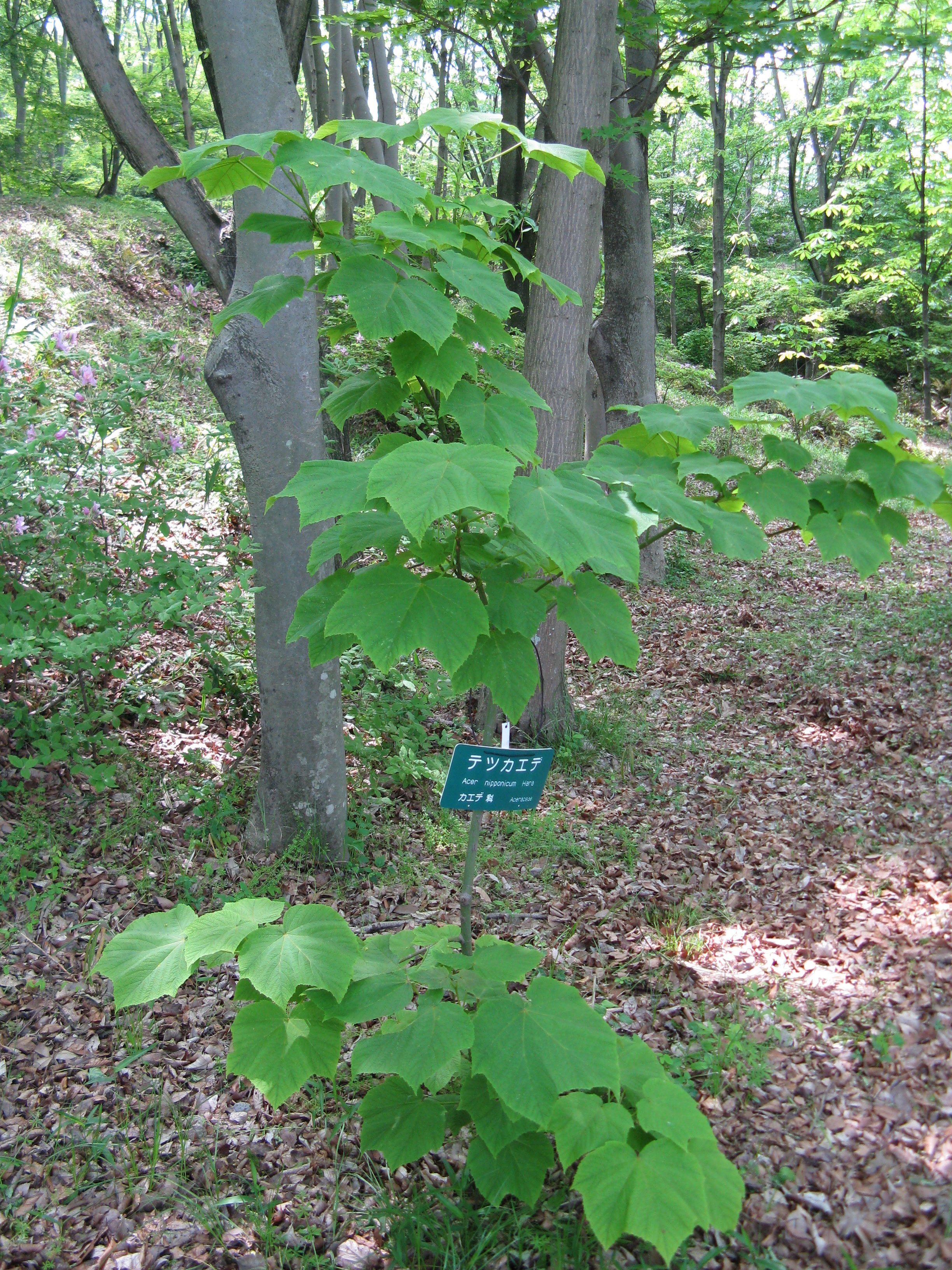 Scientific name Acer nipponicum